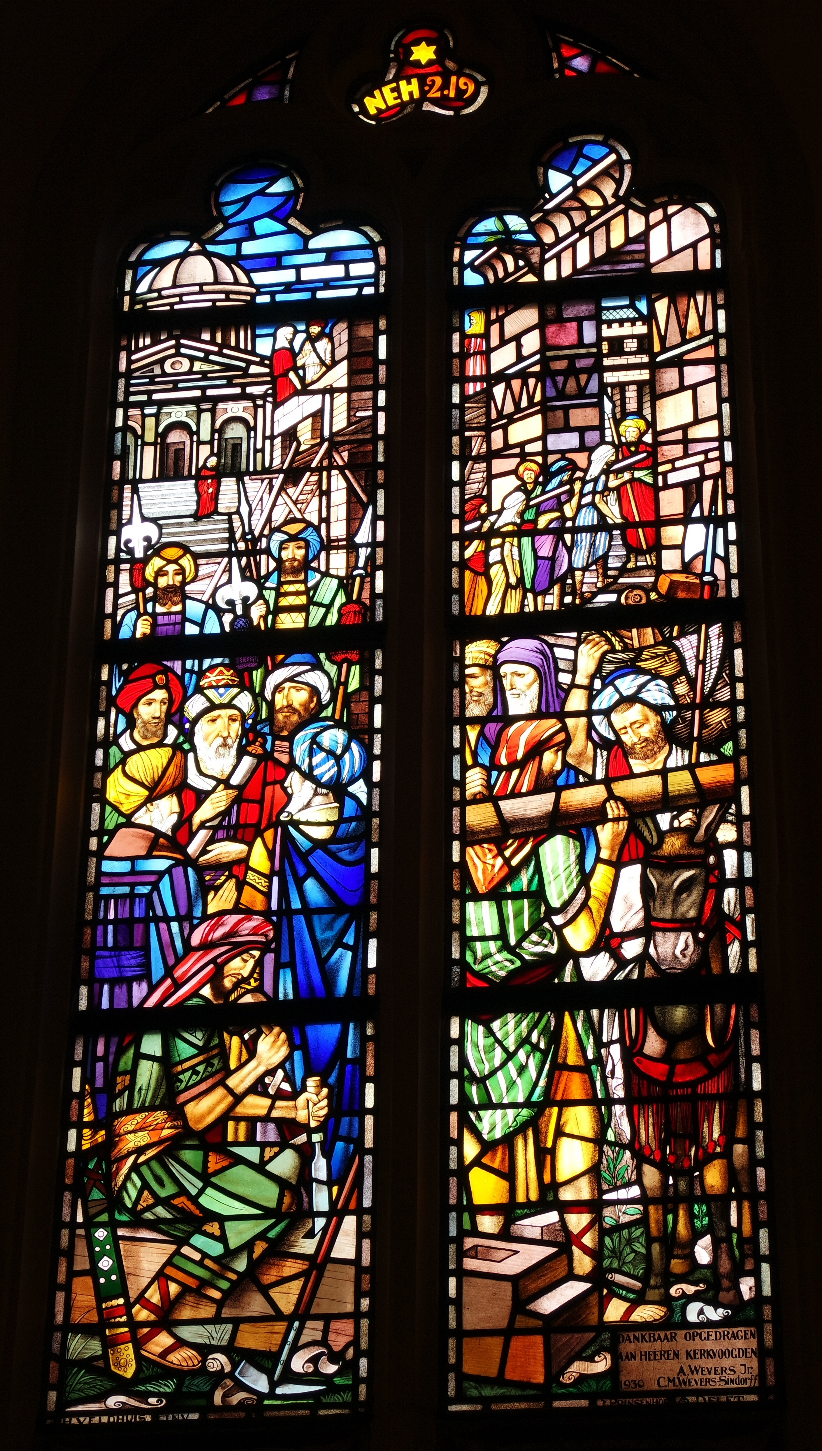 Gebrandschilderd glas-in-loodraam 4 van de Grote Kerk op de Oude Markt te Enschede.